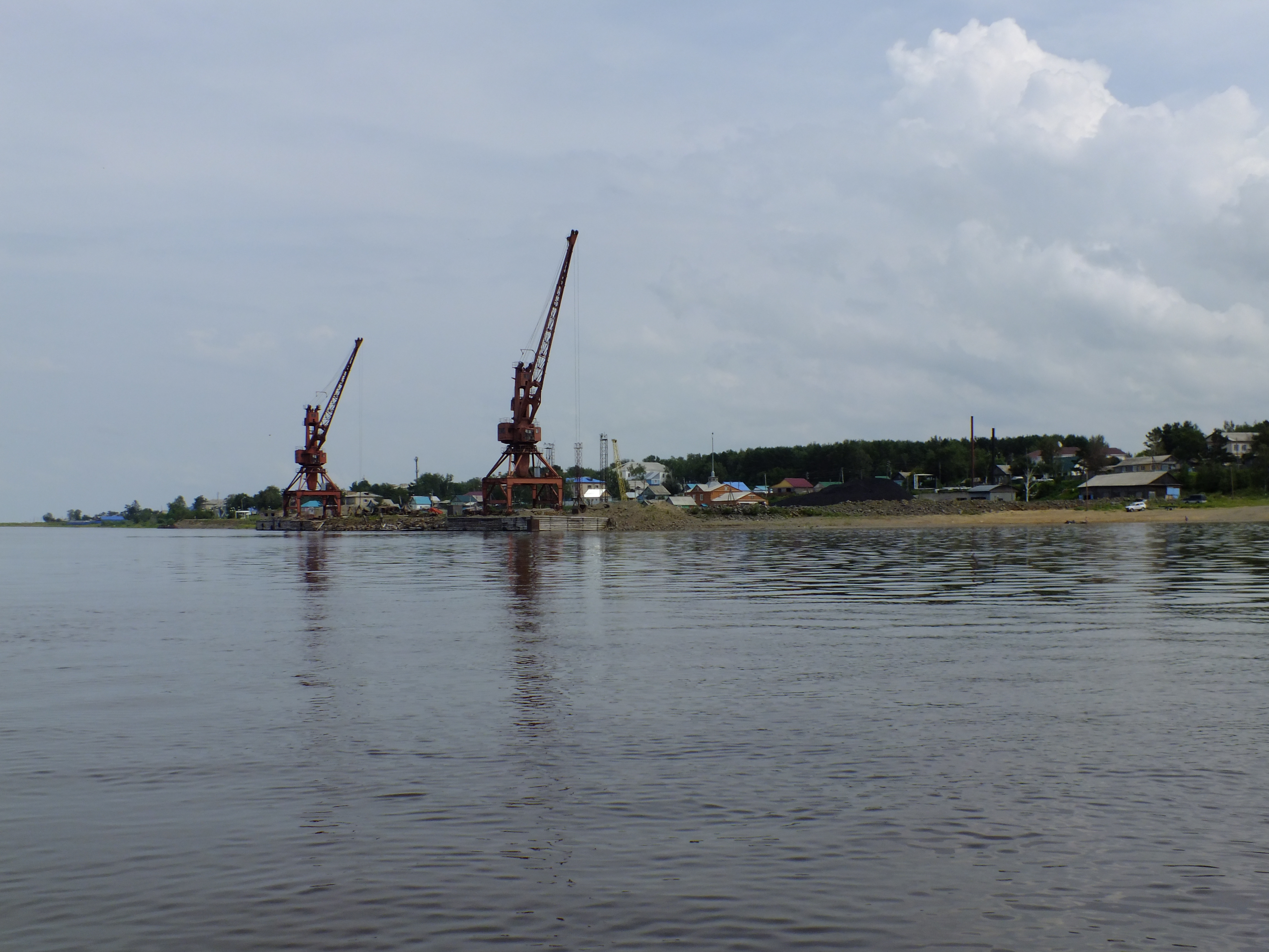 Село Троицкое Нанайский район Хабаровский край